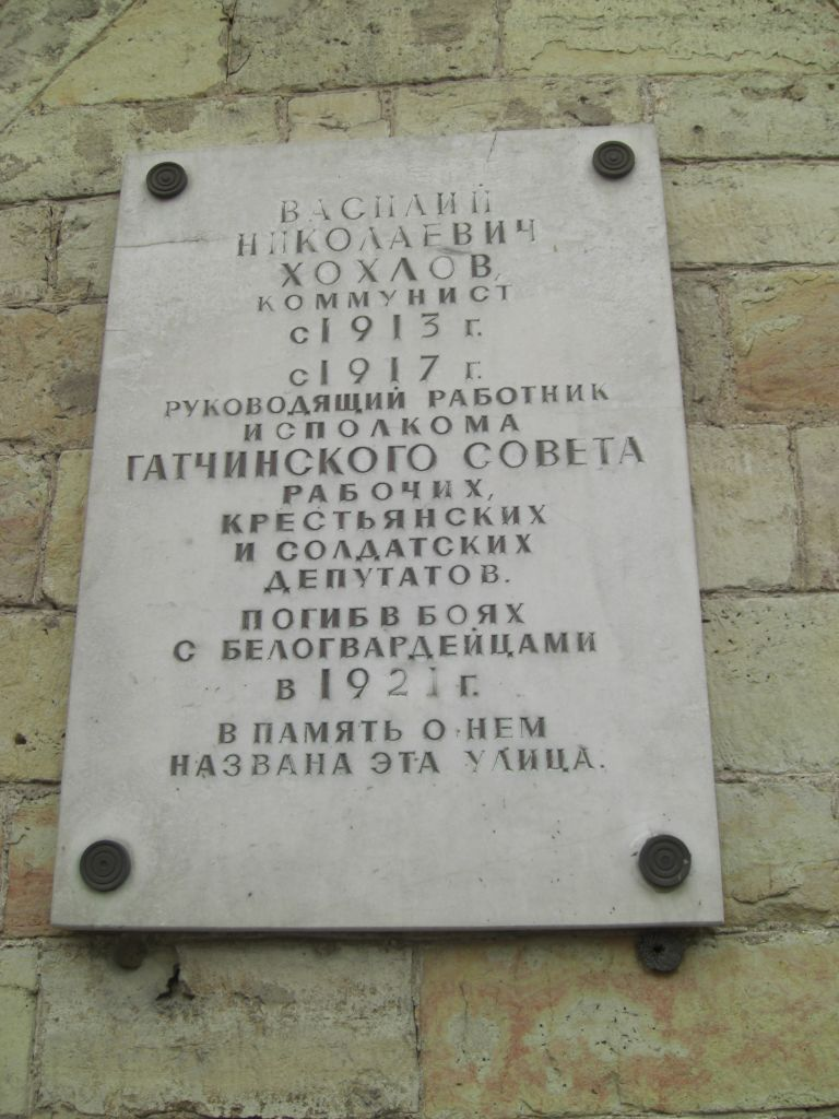 Мемориальная доска на улице Хохлова в Гатчине